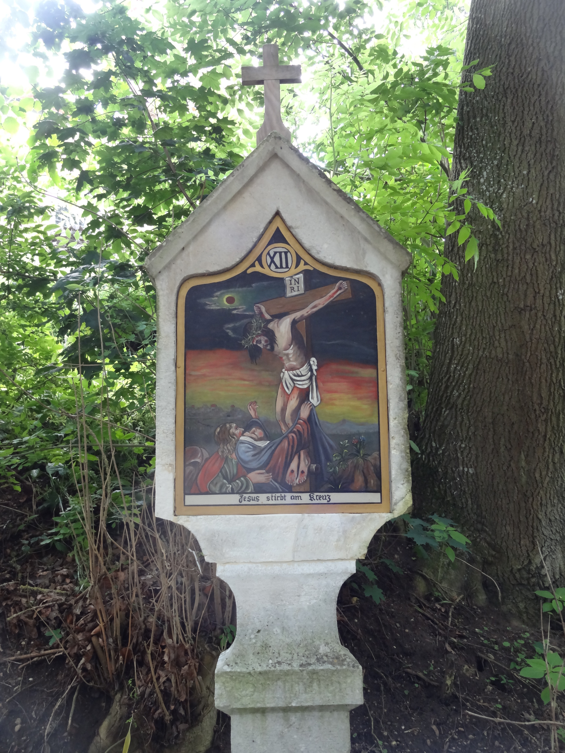 Kreuzwegstation am Klausenberg (Kreuzweg zur Klausenkirche) in Pfeffenhausen (Lkr. Landshut)